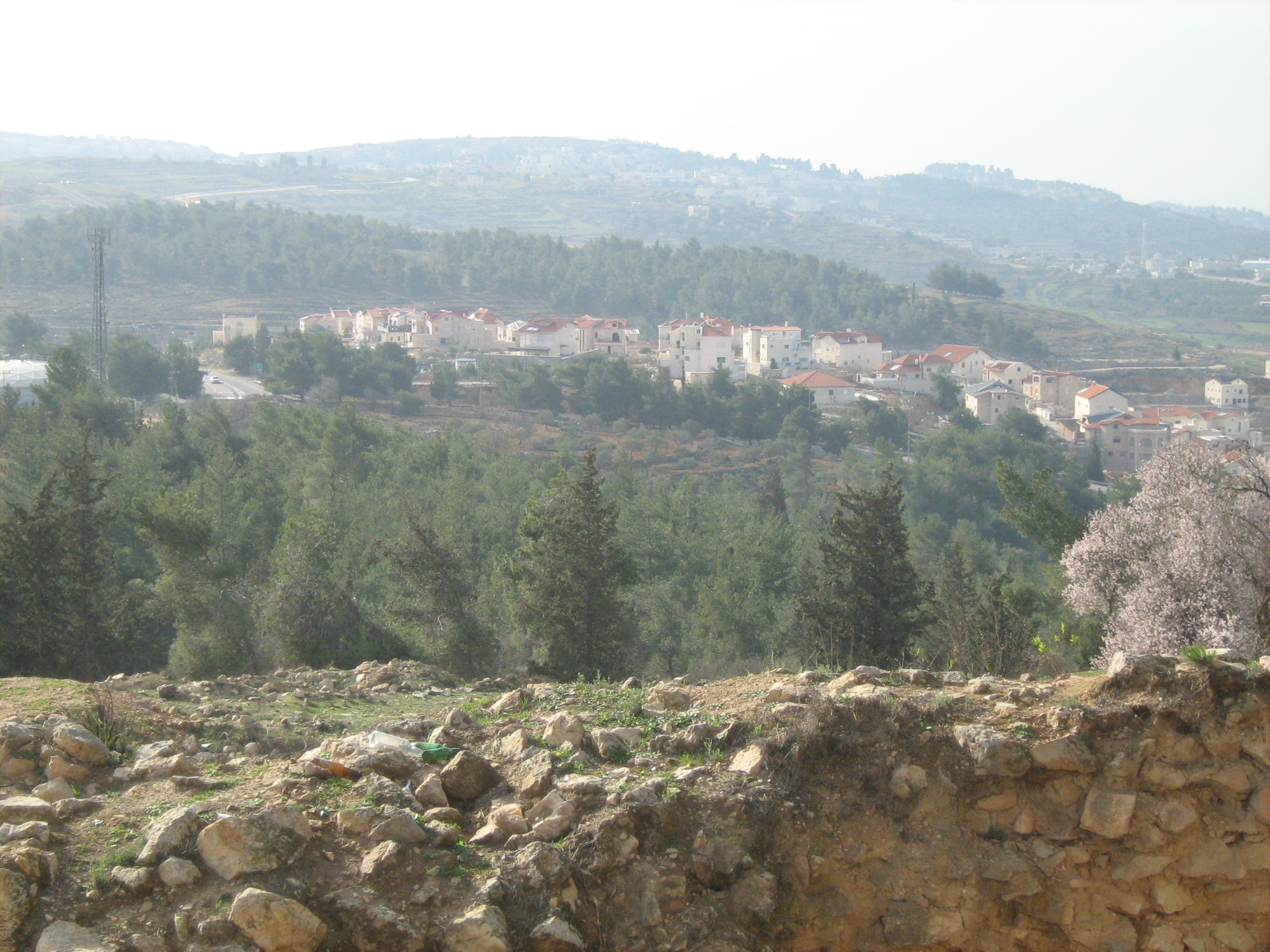 הר שמואל